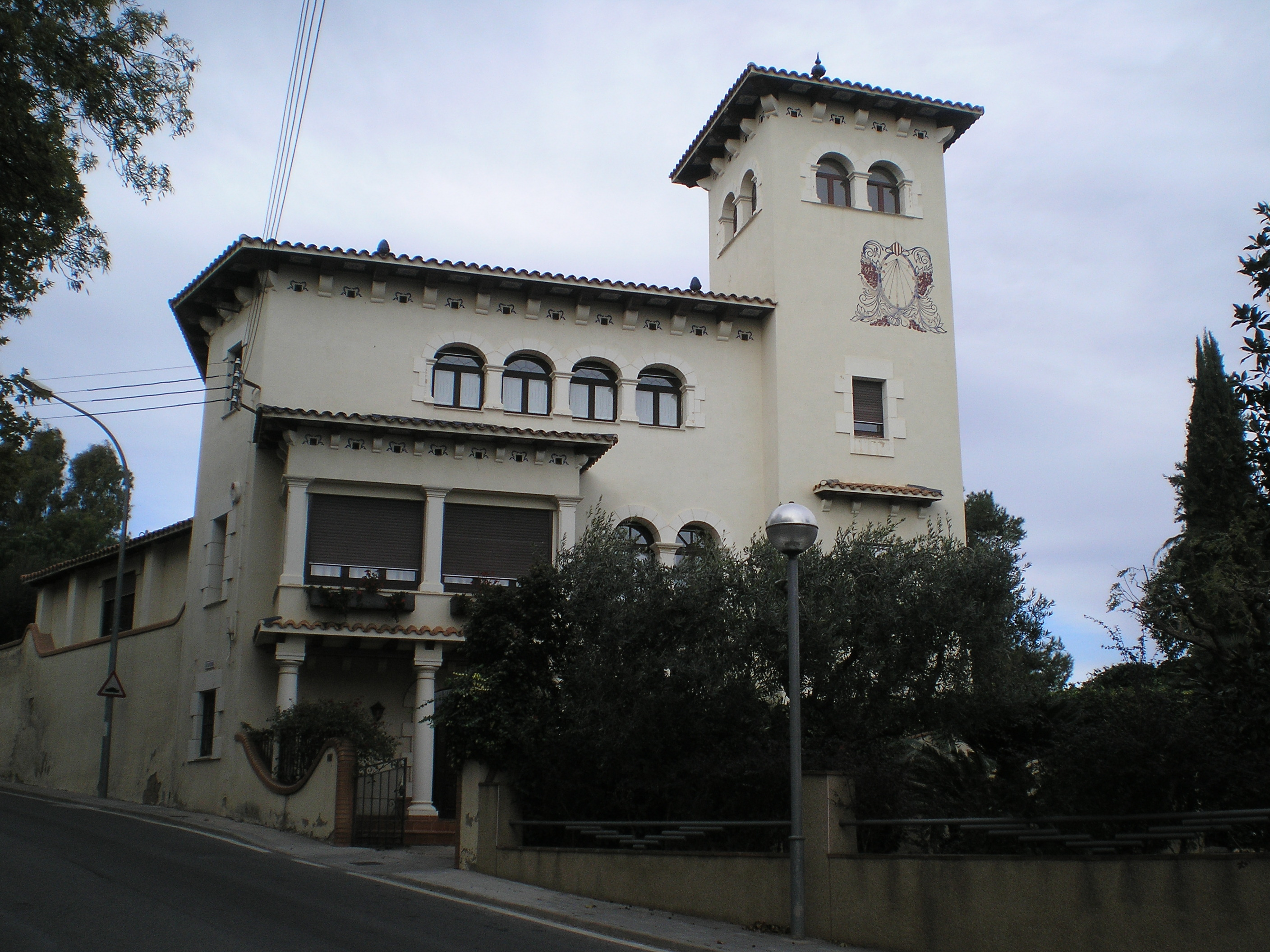 La Soleiada, casa senyorial d'estil noucentista a Riudoms